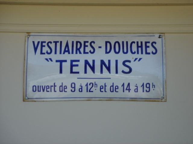 Plaque émaillée du vestiaire du tennis de Vic